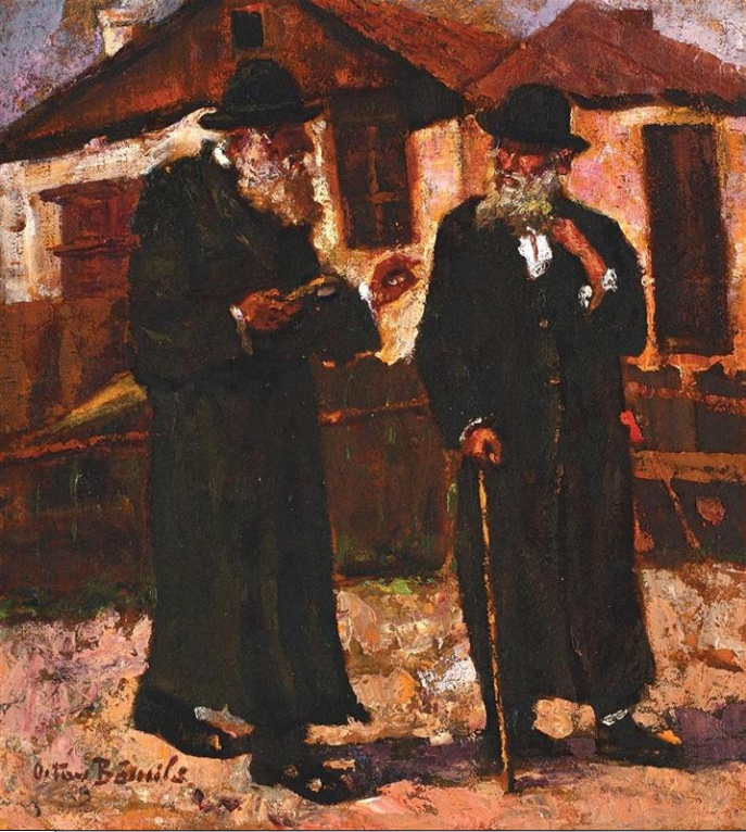 Evrei vorbind in Targul Cucu